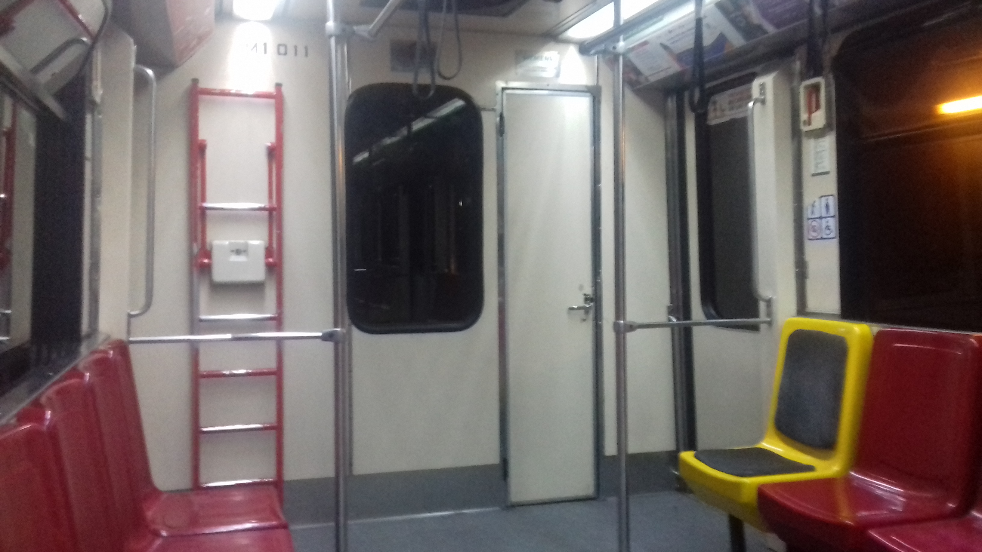 Interior de un TLG-88 en la estacion juarez